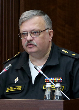 Начальник Главного военно-медицинского управления Минобороны России генерал-майор медслужбы Александр Фисун